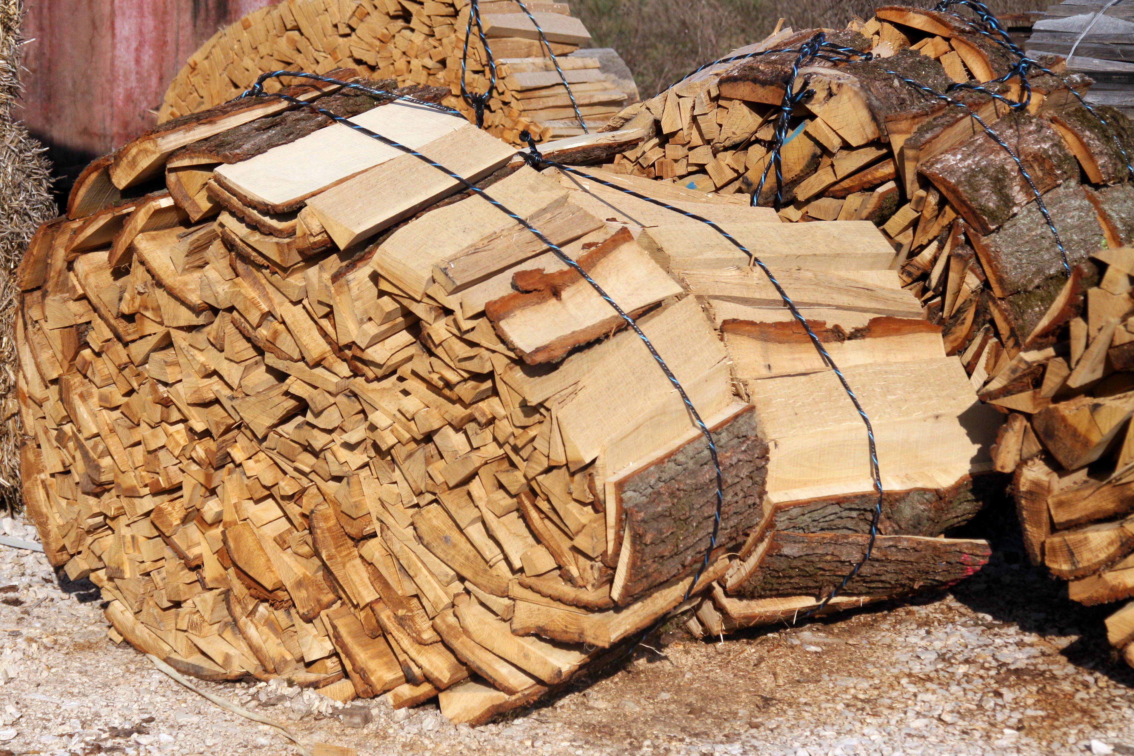 Ecorces de tronc de chenes en ballots